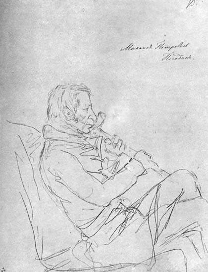 Михаил Петрович Погодин. Рисунок в профиль Э. А. Дмитриева-Мамонова